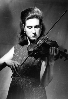 opis = Jela Špitková vo Viedni Licensing zdroj: Jela Špitková, osobne [1] Prof. Jela Špitková povoľuje použitie tohto obrázka celosvetovo.